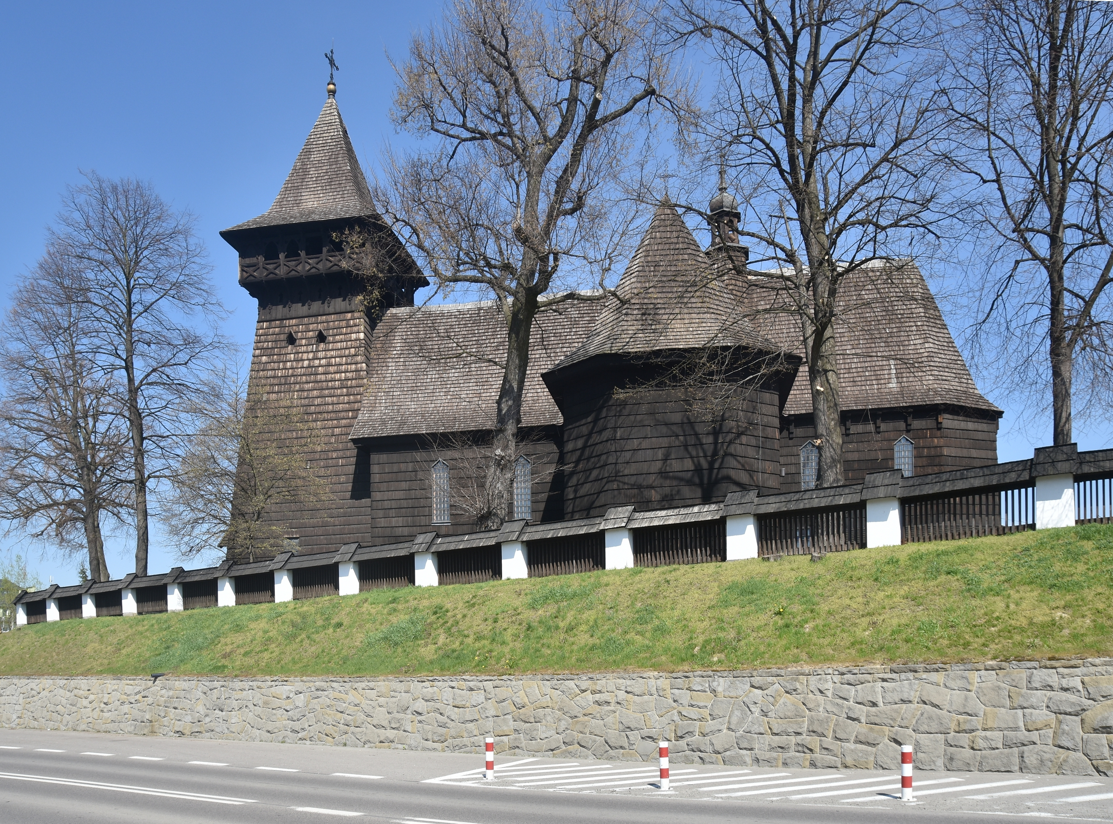 Skrzyszów, Kościół św. Stanisława w Skrzyszowie